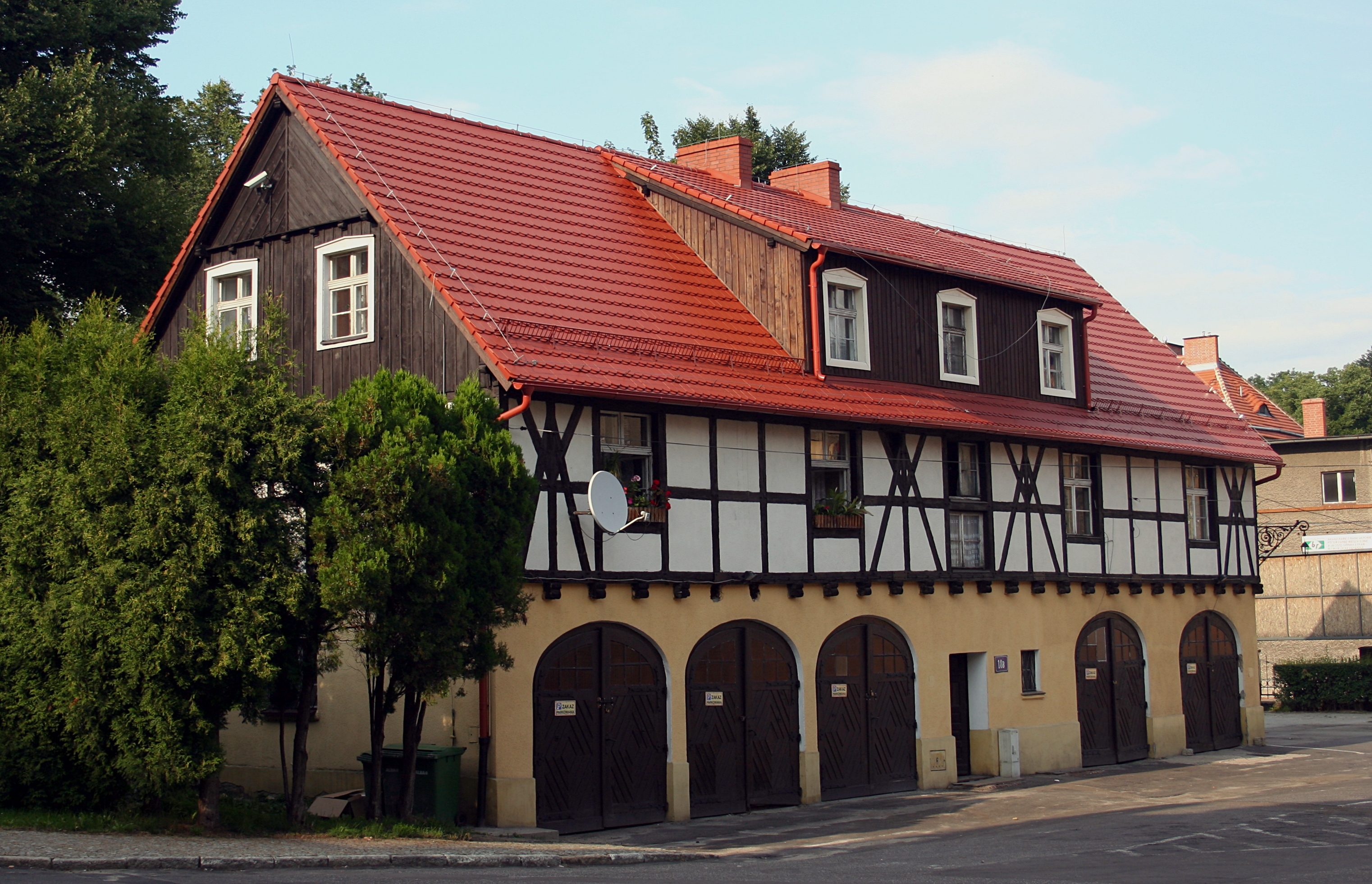 Dom w zespole dworskim Czettritzów, przy ulicy Młynarskiej 18b w Wałbrzychu (zabytek nr A/691/1338/WŁ z 7.05.1991)